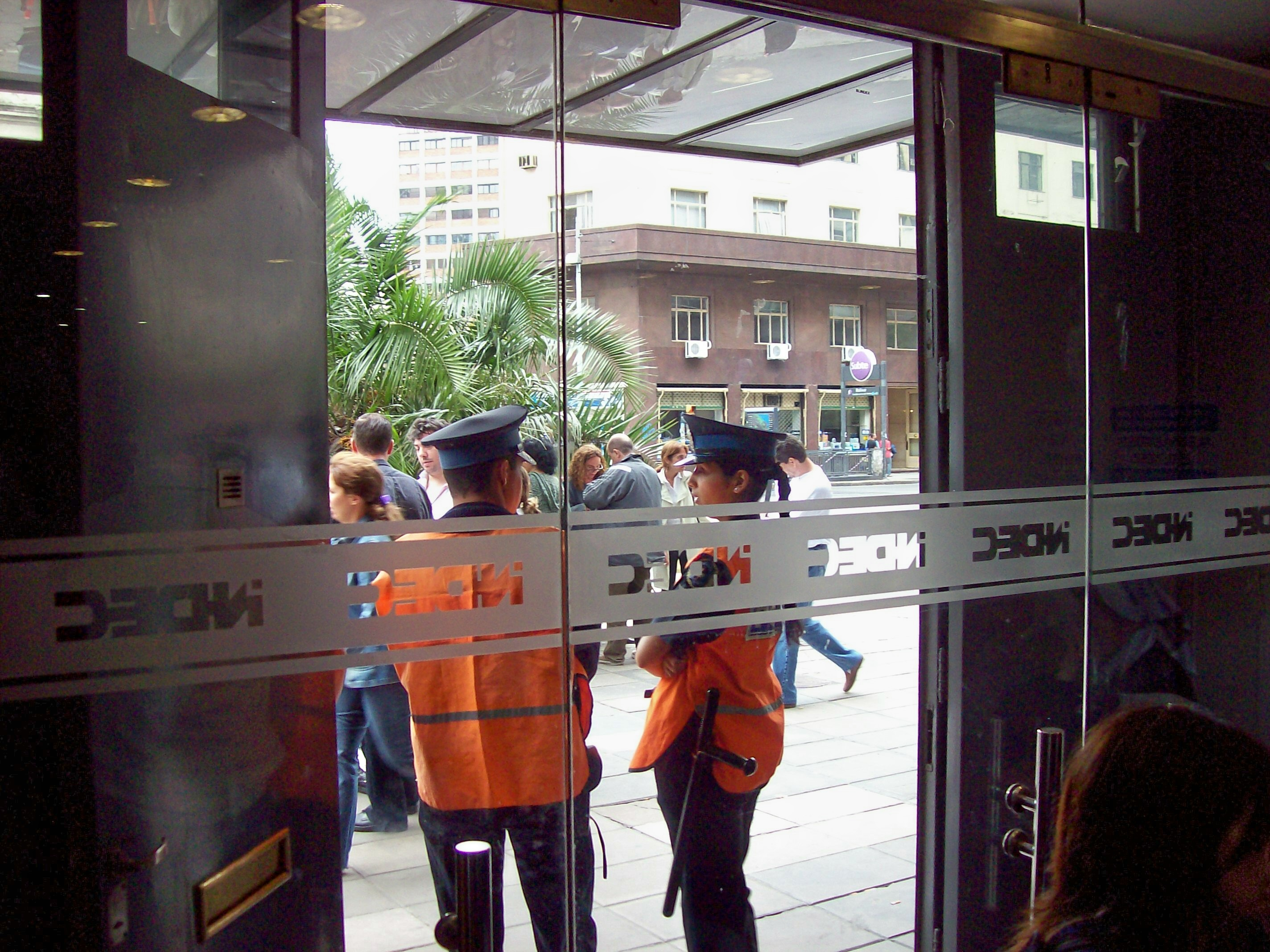 Edificio del Instituto Nacional de Estadísticas y Censos de la Argentina, situado en Julio Argentino Roca 609, Ciudad Buenos Aires, custodiado por la Policía Federal.